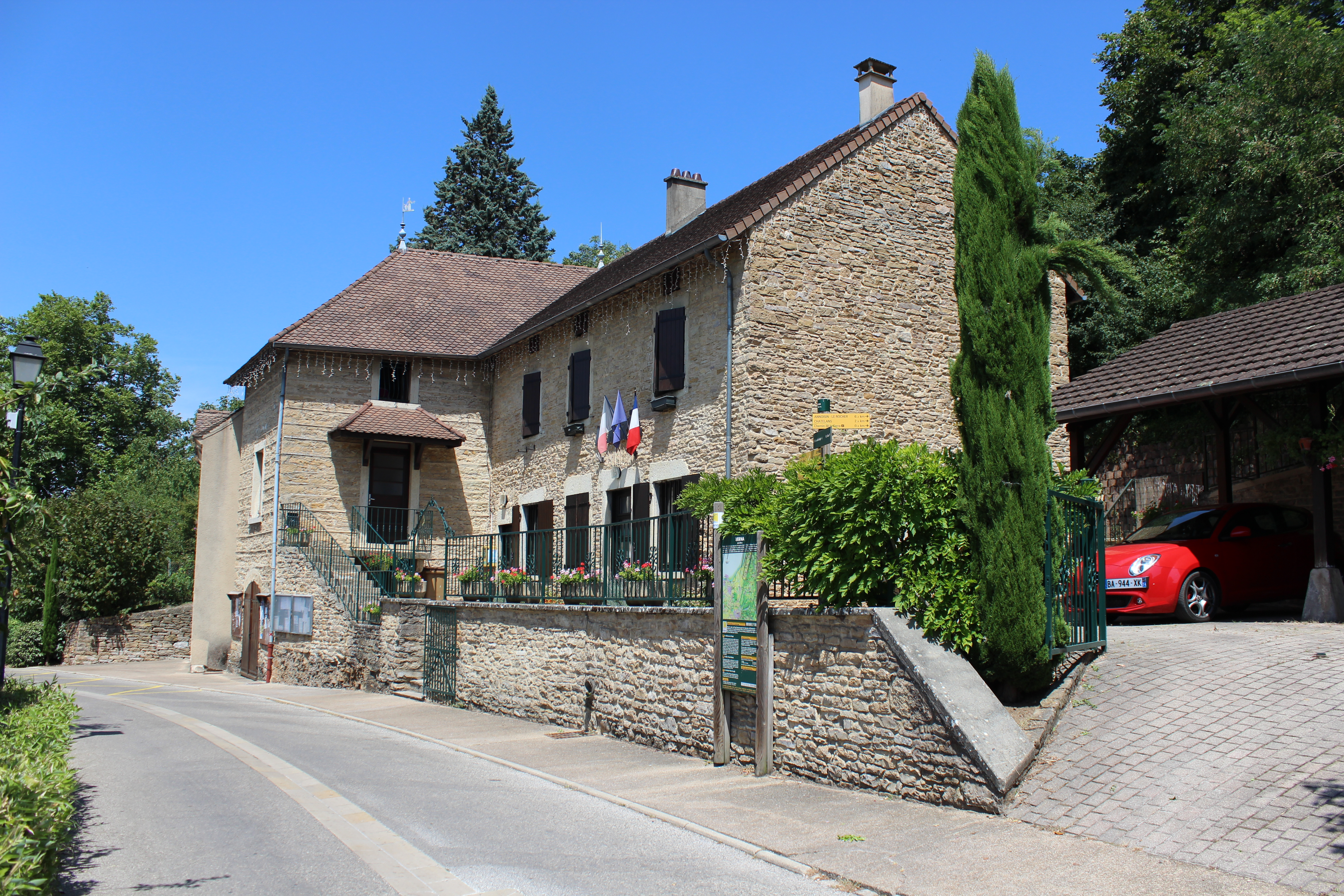 Mairie de Verna (Isère).